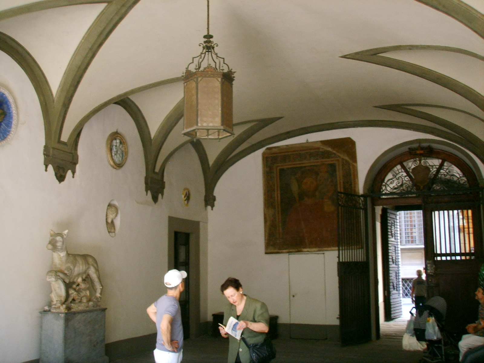 Palazzo malenchini alberti, atrio